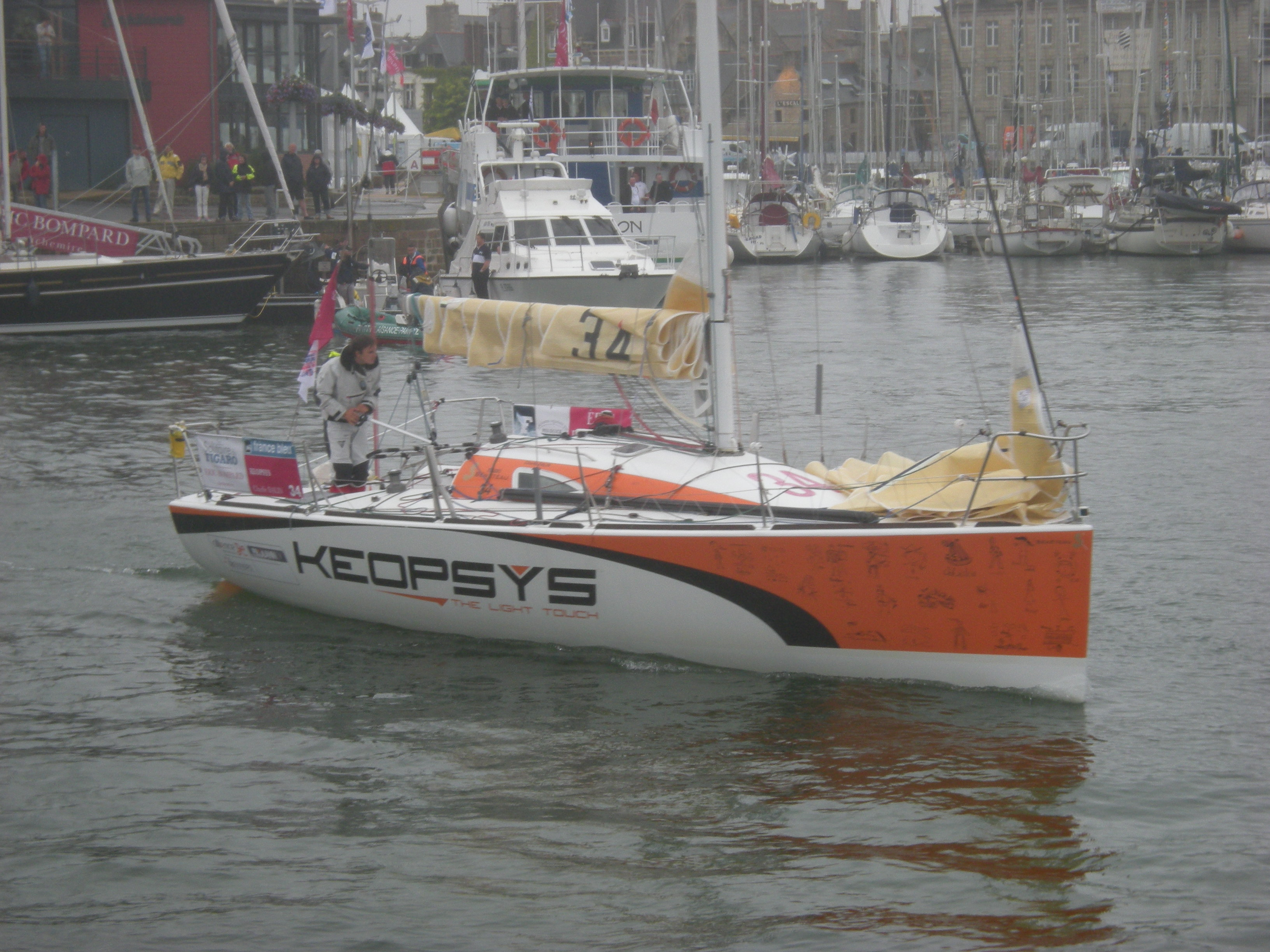 Dans le port de Paimpol avant le départ de la première étape de la Solitaire du Figaro 2012